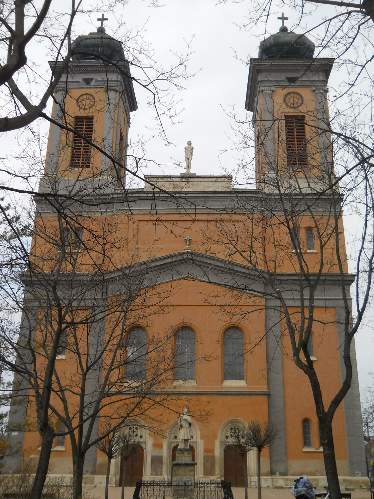 Székesfehérvár - Szent Sebestyén-templom